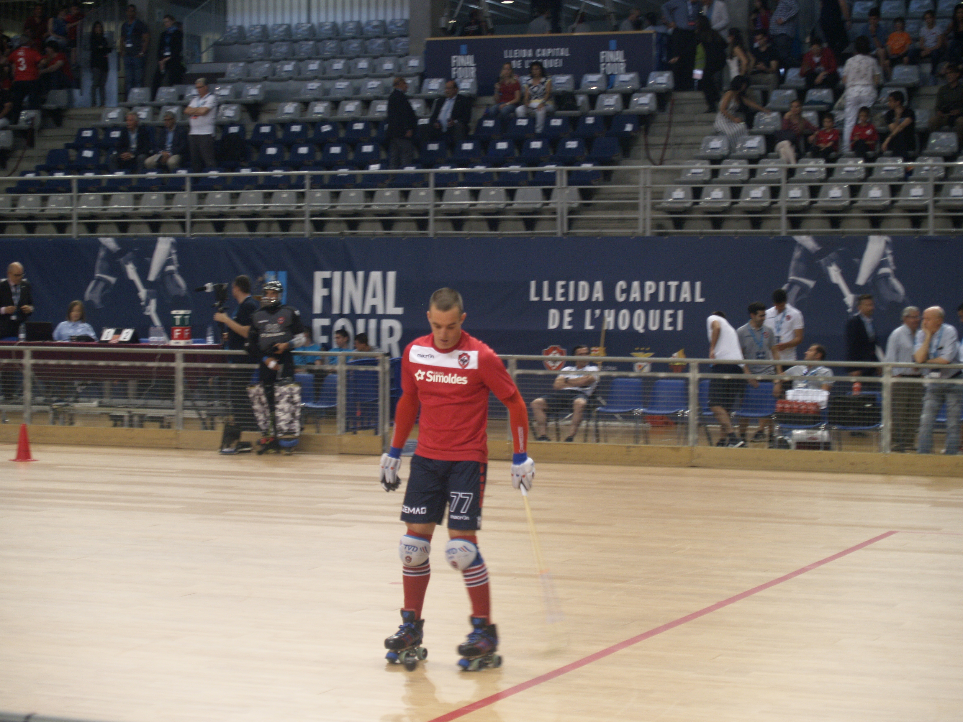 Final de la CERH European League 2016-17 celebrada en Lleida entre el Oliveirense y el Reus.